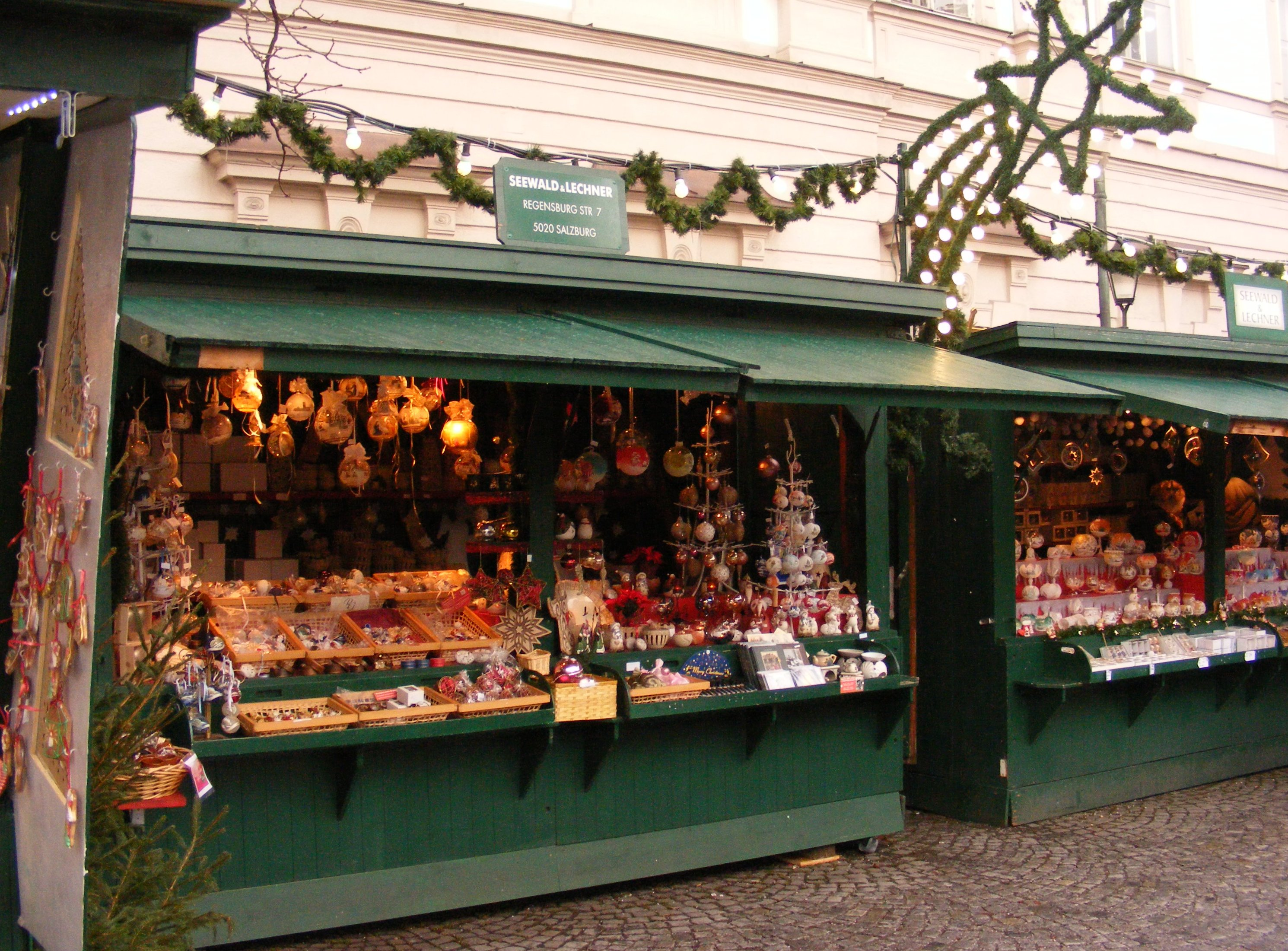 Stand am Weihnachtsmarkt am Mirabellplatz, Salzburg